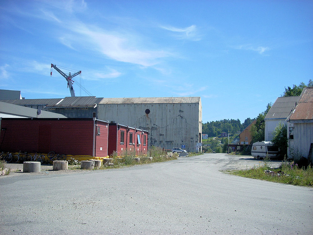 Eydehavn Industriområde, Eydehavn, Arendal Kommune, Aust-Agder, Norge